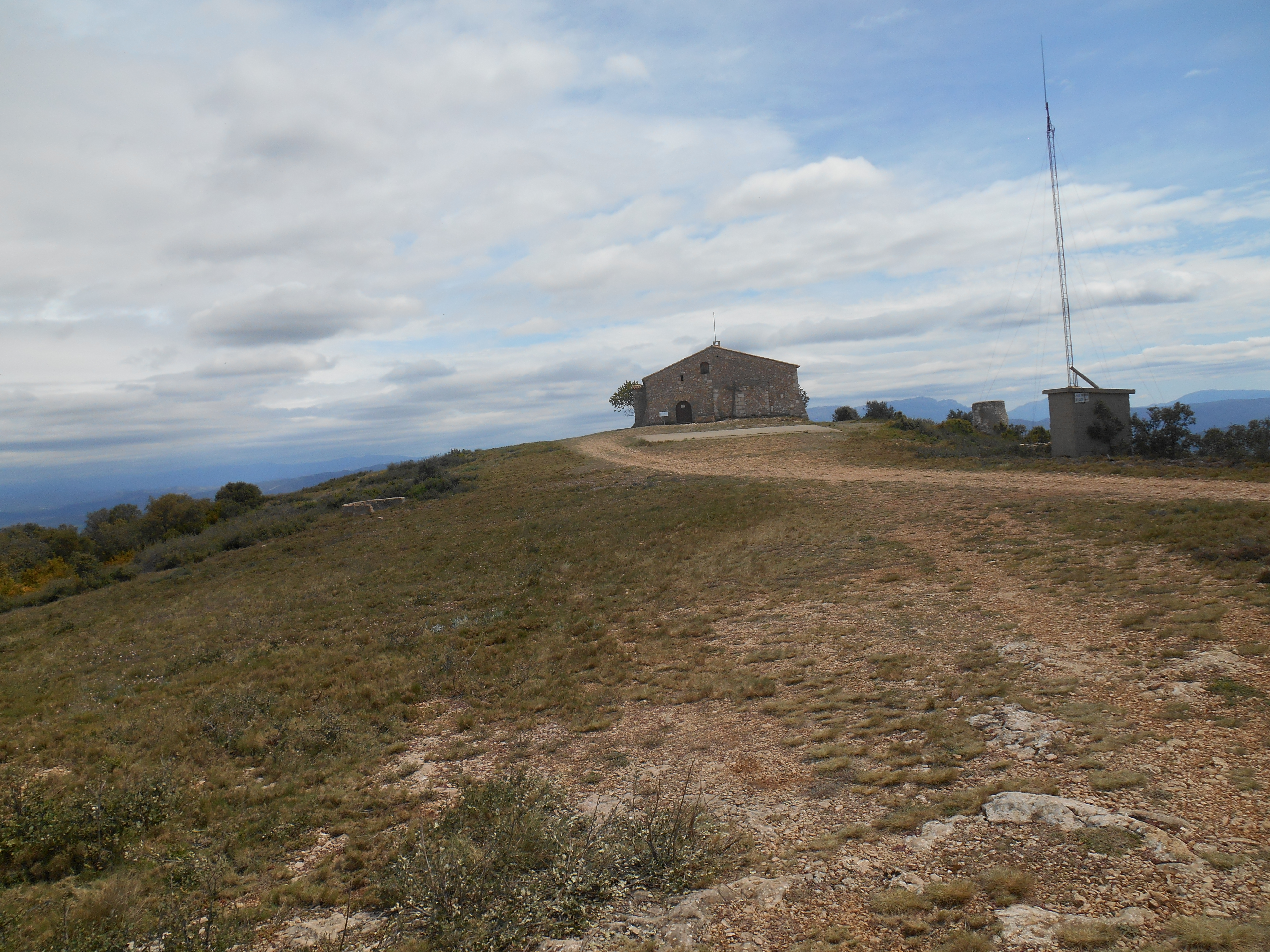 Ermita de San Quílez, situada a 1.084 metros